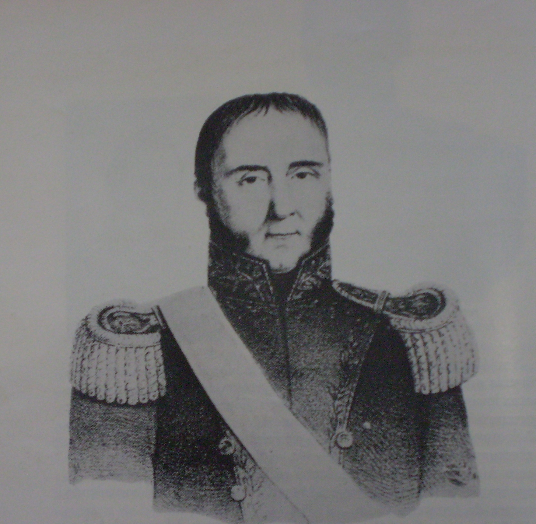 Pedro Molina, litografía de César H. Bacle. Museo Histórico Nacional